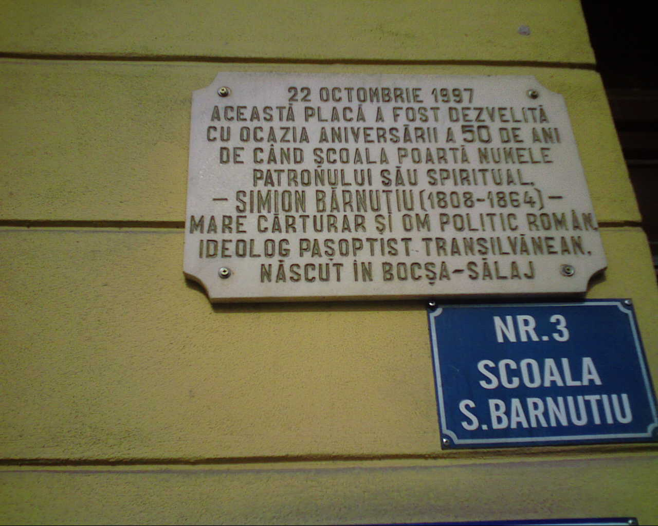 Placă comemoretivă pe Şcoala Gimnazială "Simion Bărnuţiu" Zalău "22 octombrie 1997. Această placă a fost dezvelită cu ocazia aniversării a 50 de ani de când şcoala poartă numele patronului său spiritual, - Simion Bărnuţiu (1808-1864) - mare cărturarşi om politic român, ideolog paşoptist transilvănean, născut în Bocşa-Sălaj."